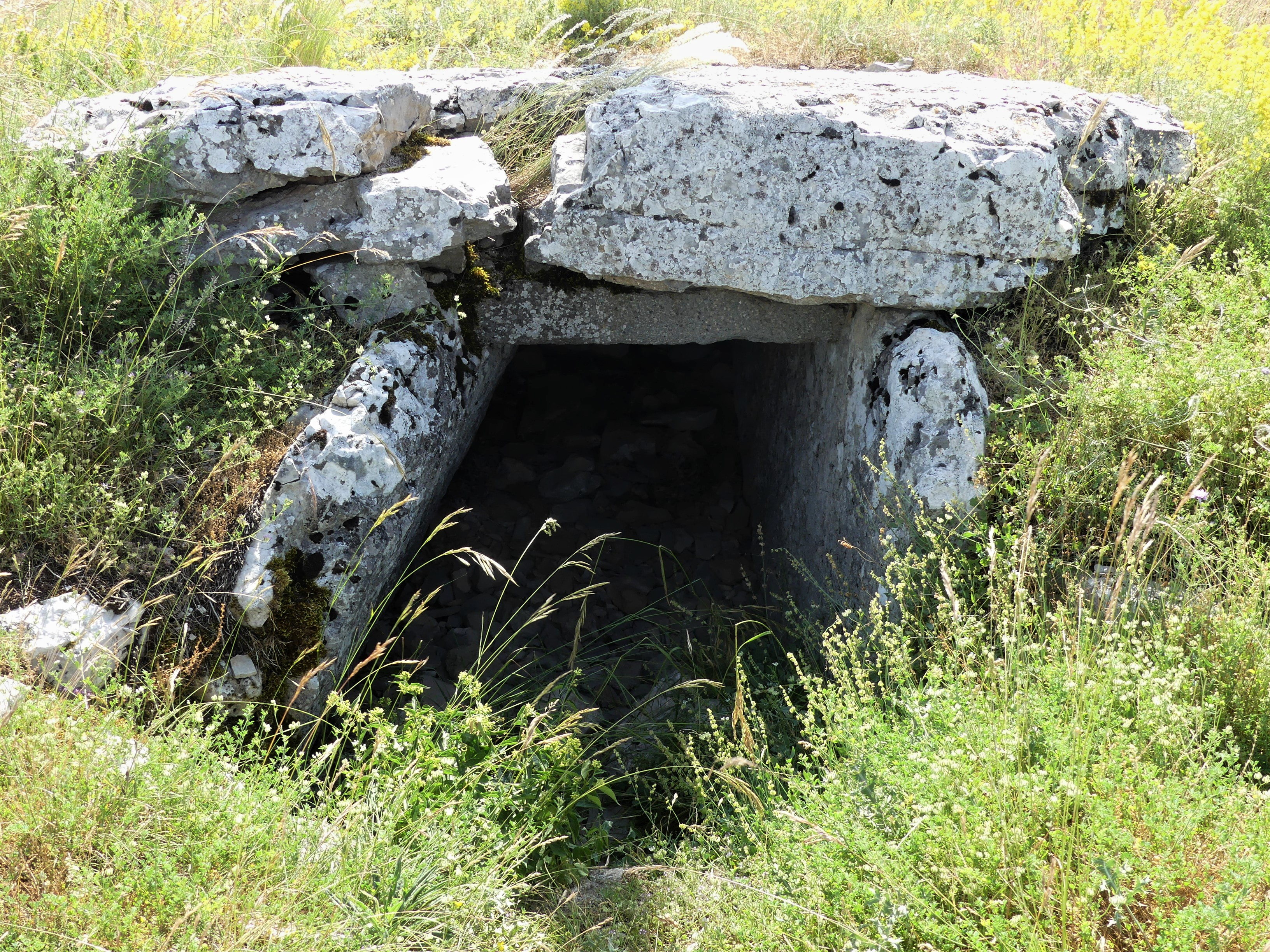 Dolmen appelé « tombe du Géant » sur le causse Méjean, Hures-la-Parade, Lozère, France.